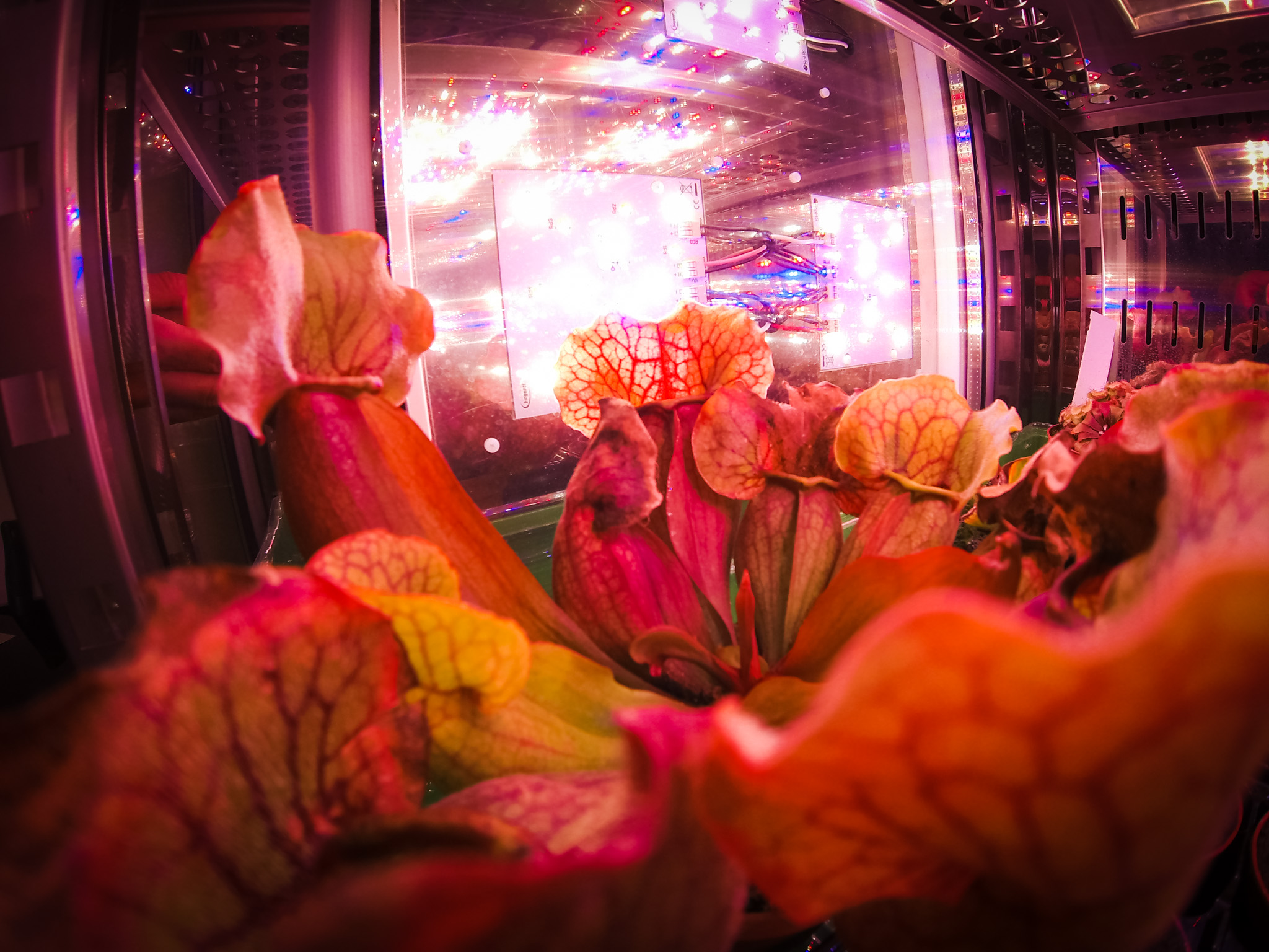 Kapturnica (Sarracenia L.).Laboratorium biologiczne, Centrum Nauki Kopernik, fot. Robert Kowalewski